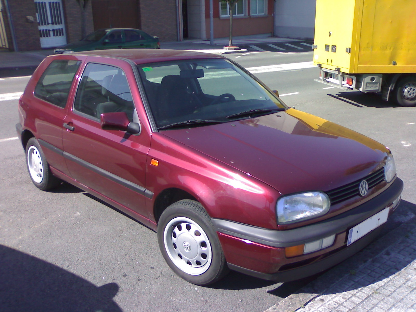 Un Volkswagen Golf de la tercera generación (1991-1997).